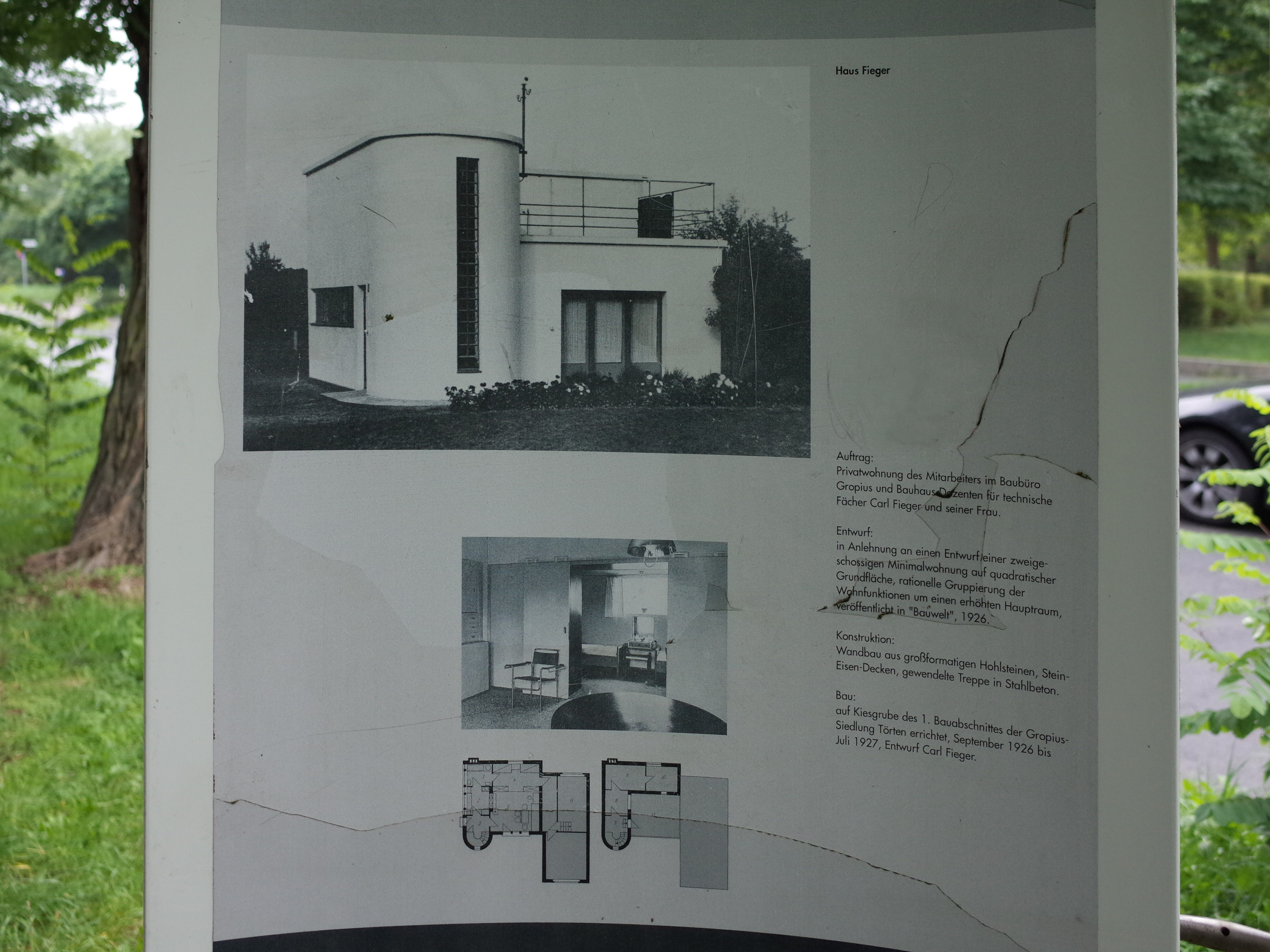 Dessau-Roßlau, Ausschnitt von Informationstafel am Haus Fieger